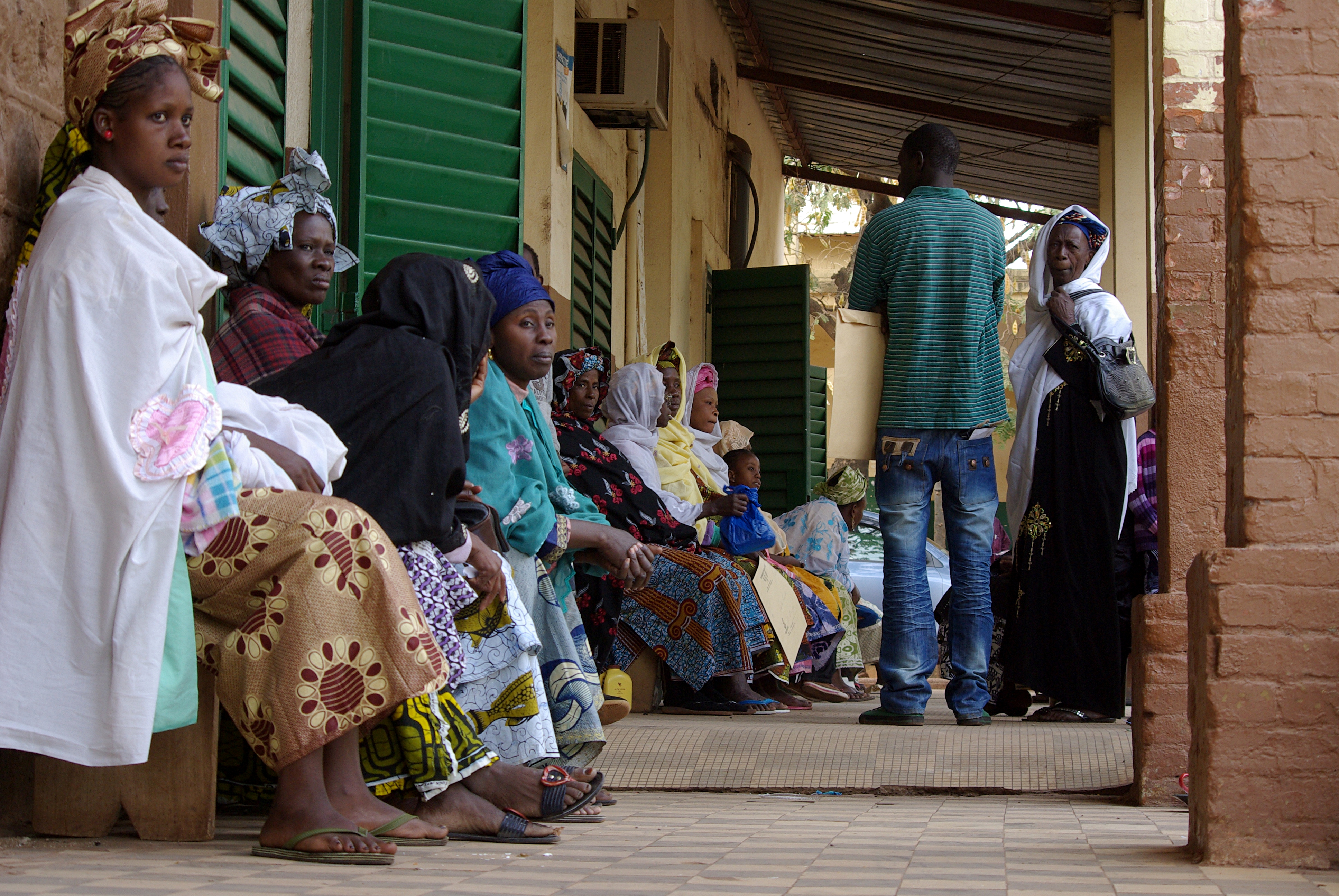 Olivier Hebrard, OTRS pending